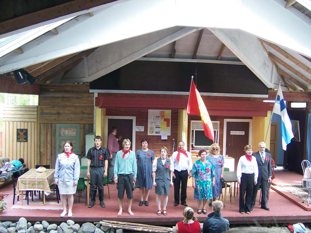 Paukkaja theatre Eno